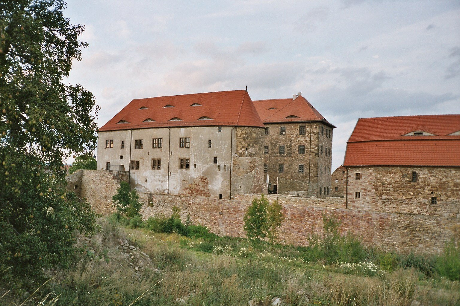 Das Renaissance-Schloß der Festung Heldrungen, GNU FDL.